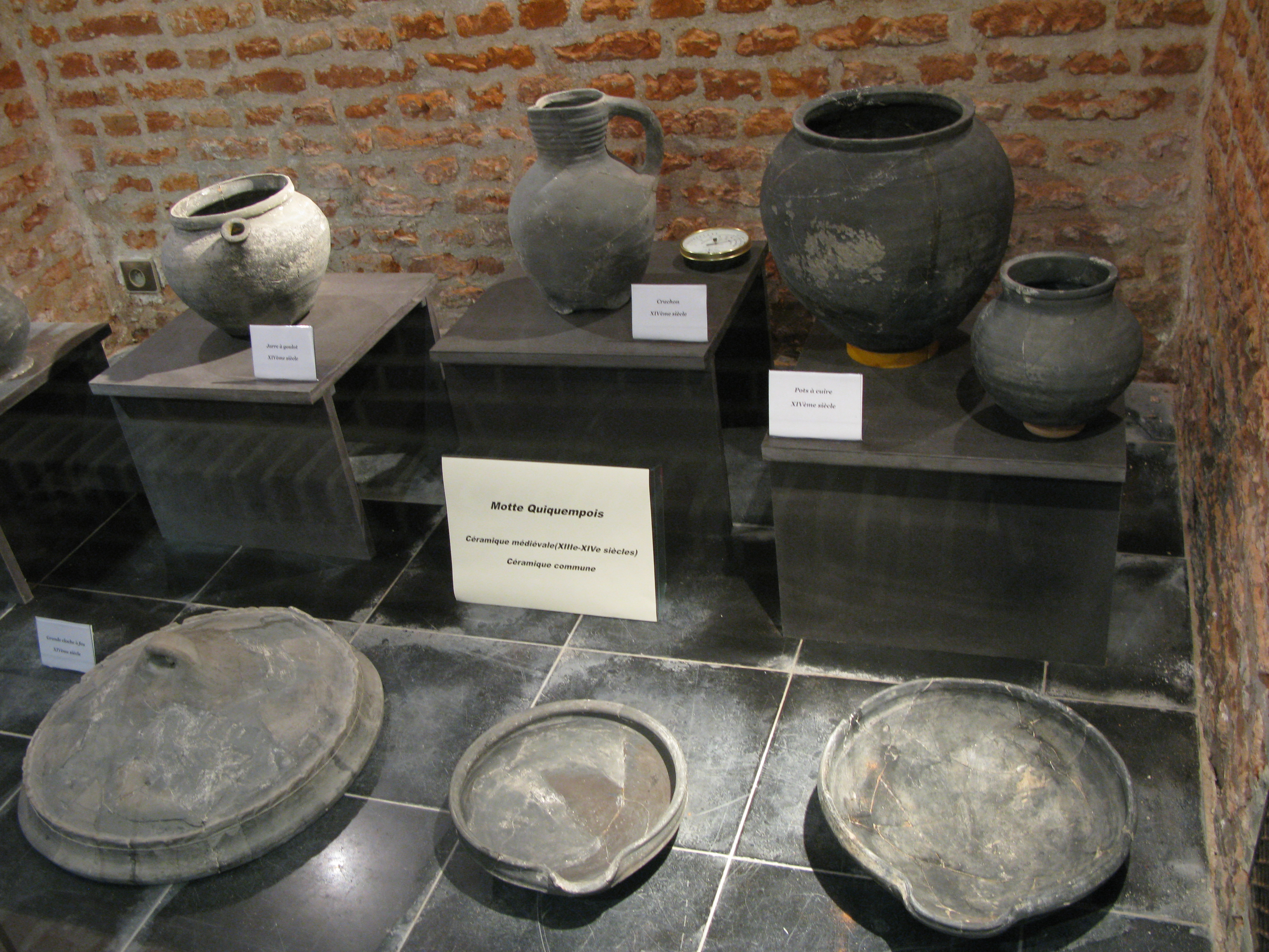 Objets de céramique médiévale commune des XIIIe et XIVe siècles trouvés à la motte Quiquempois de Villeneuve-d'Ascq.